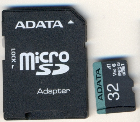 ADATA Micro- SD-Karte 32 GB.